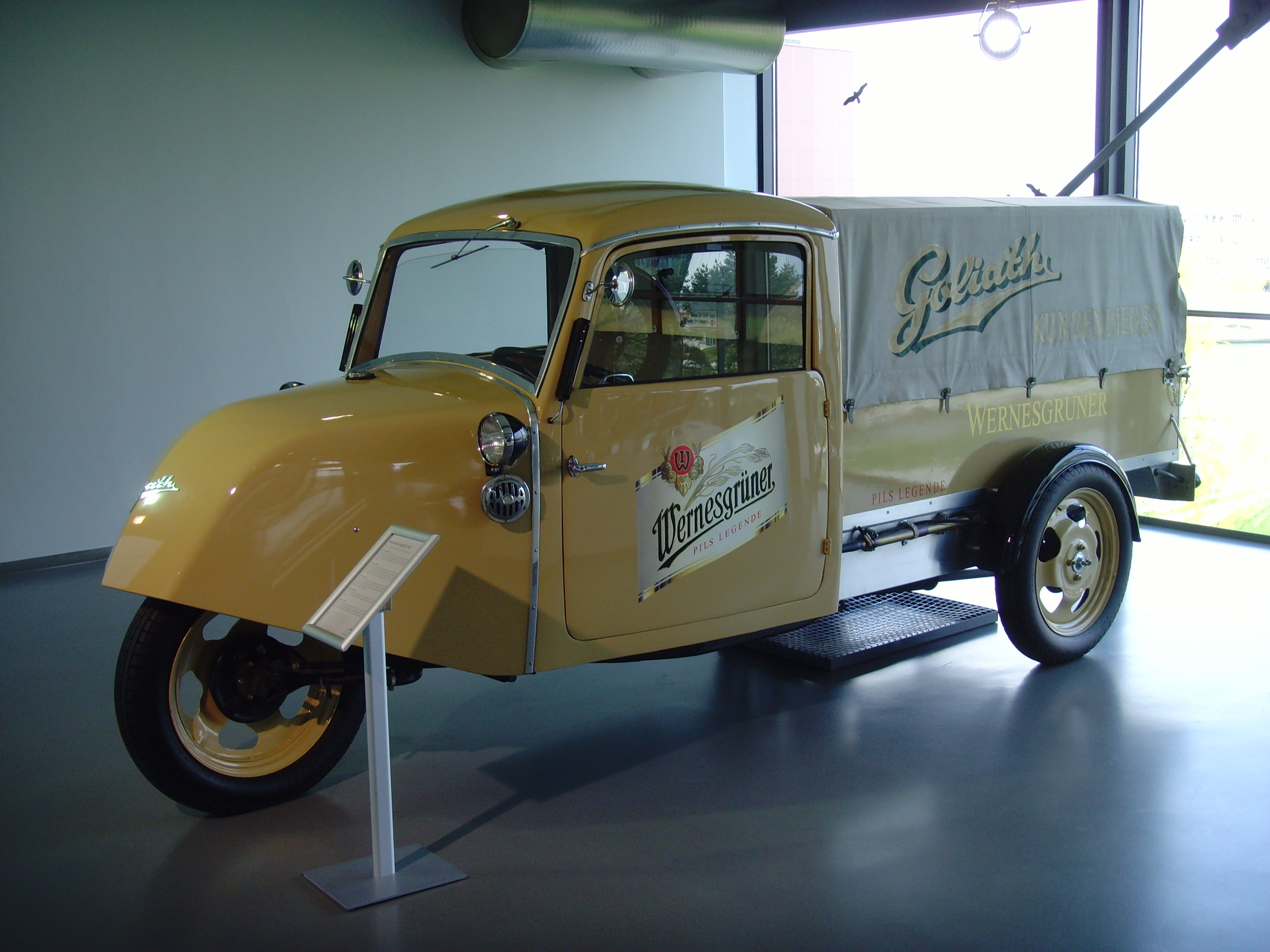 Autostadt Wolfsburg - ZeitHaus - Goliath Wernesgrüner